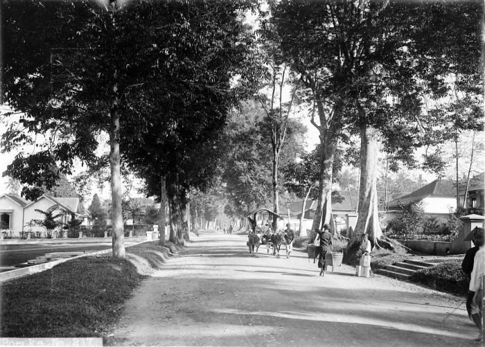 Negatief. De Toetangsche weg te Salatiga, Midden-Java